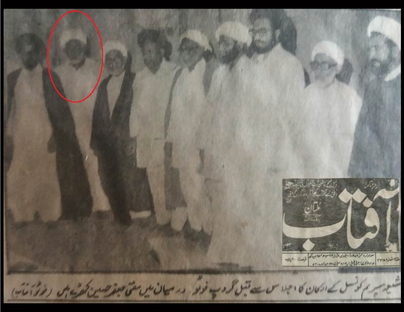 شیعہ علماء کونسل کے اراکین اجلاس سے قبل گروپ فوٹو، علامہ حسین بخش جاڑا اعلی اللہ مقامہ بھی موجود ہیں